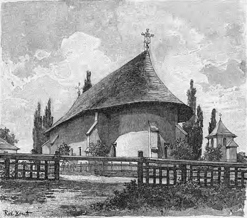 Manastirea ortodoxa din Radauti - probabil Bogdana. Grafică de epoca, semnatura indescifrabila.